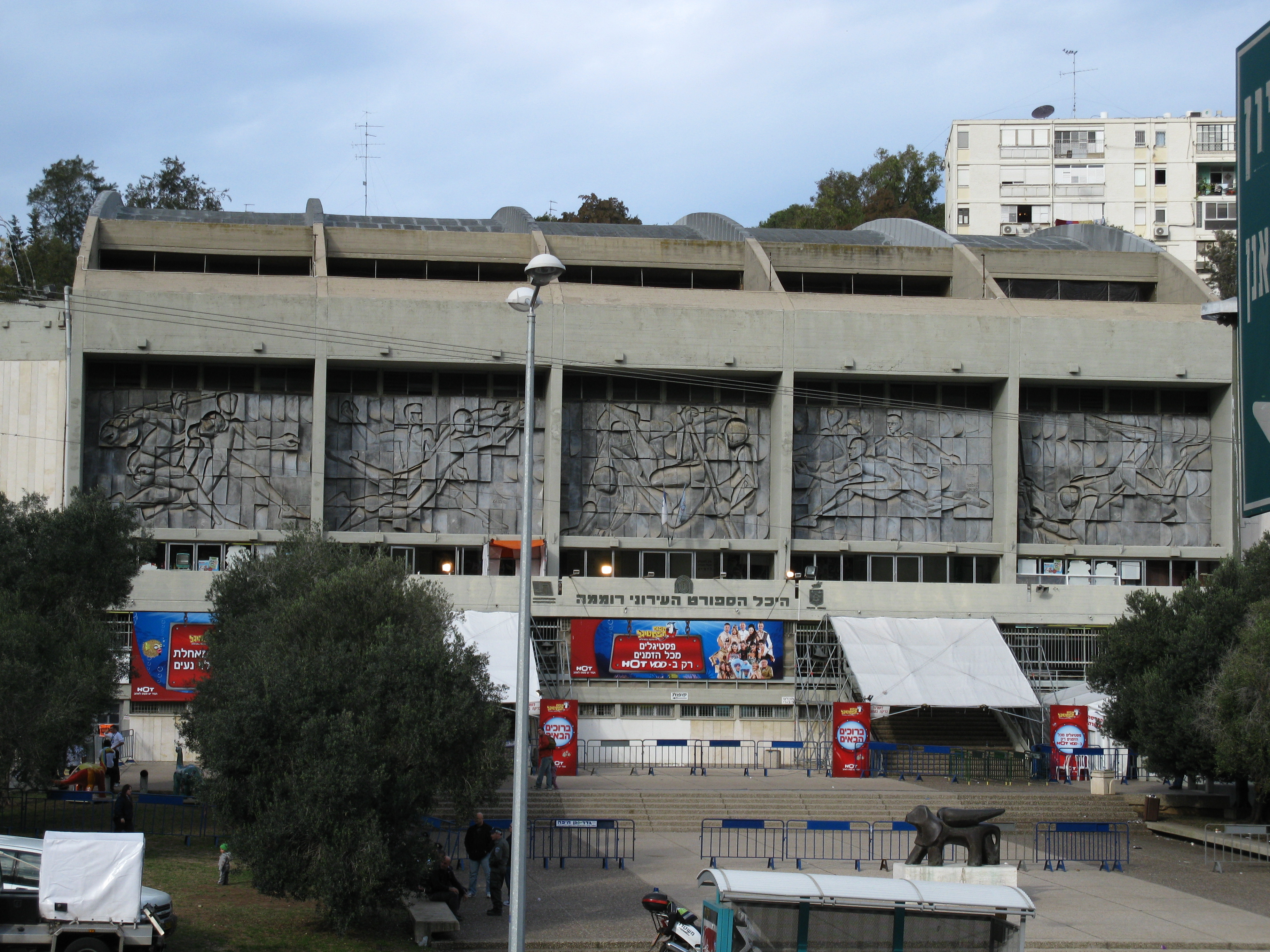 חזית היכל הספורט רוממה